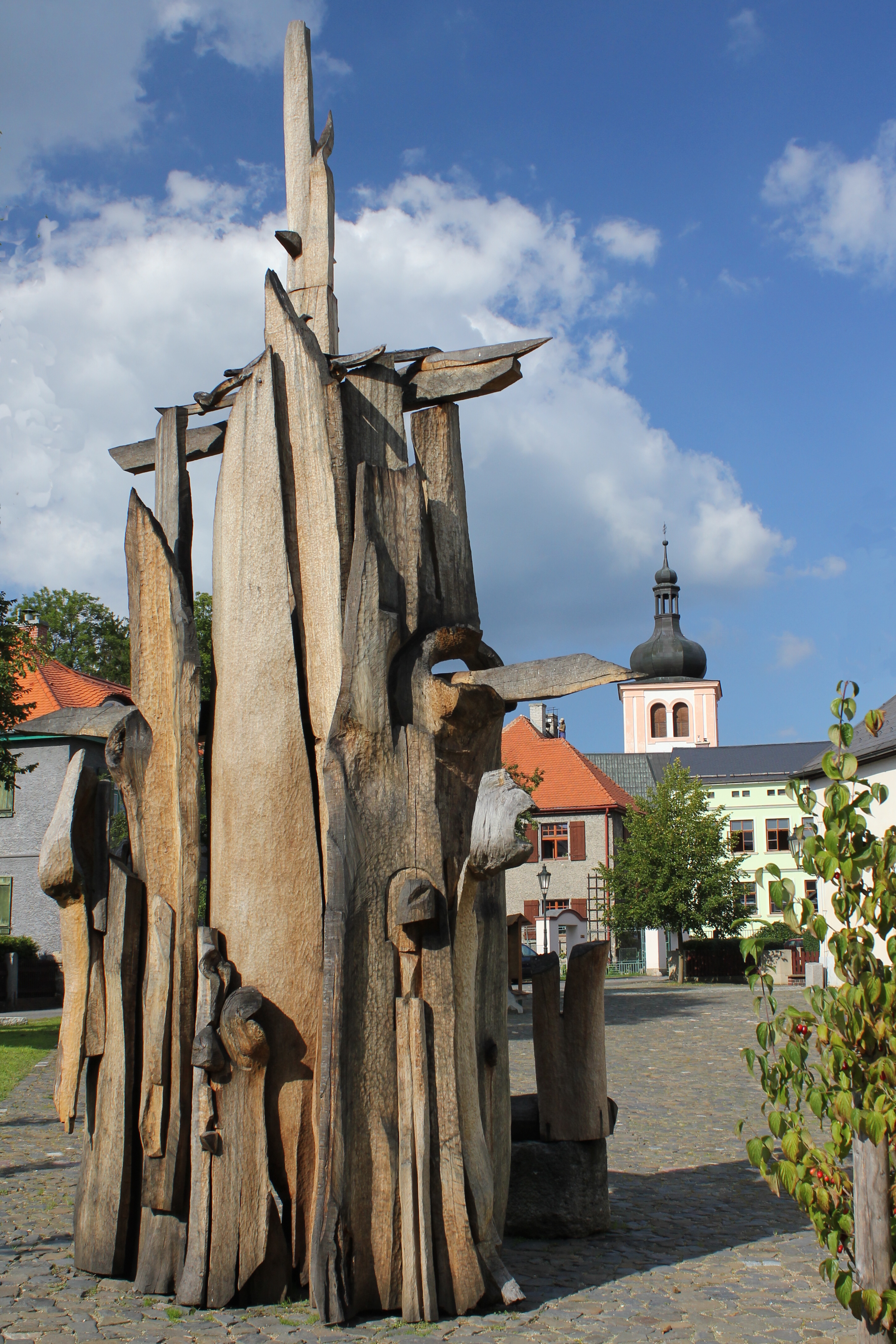 Nádvoří johanitské komendy (Rajský dvůr), Český Dub